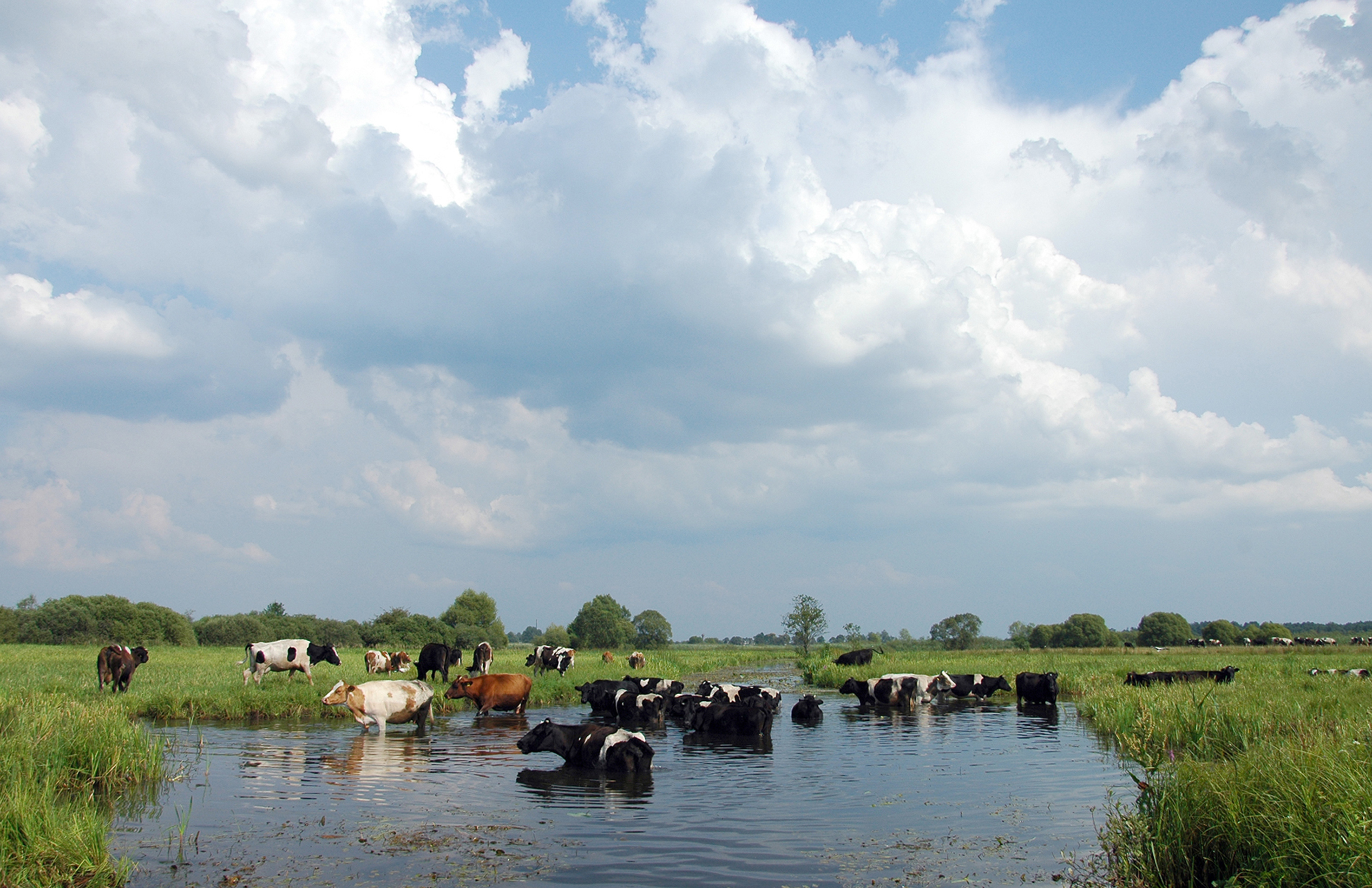 Заказник "Стохід". Волинь. Полісся. Камінь - Каширський район. с. Тоболи. Річка Стохід. Урочище Вирок.